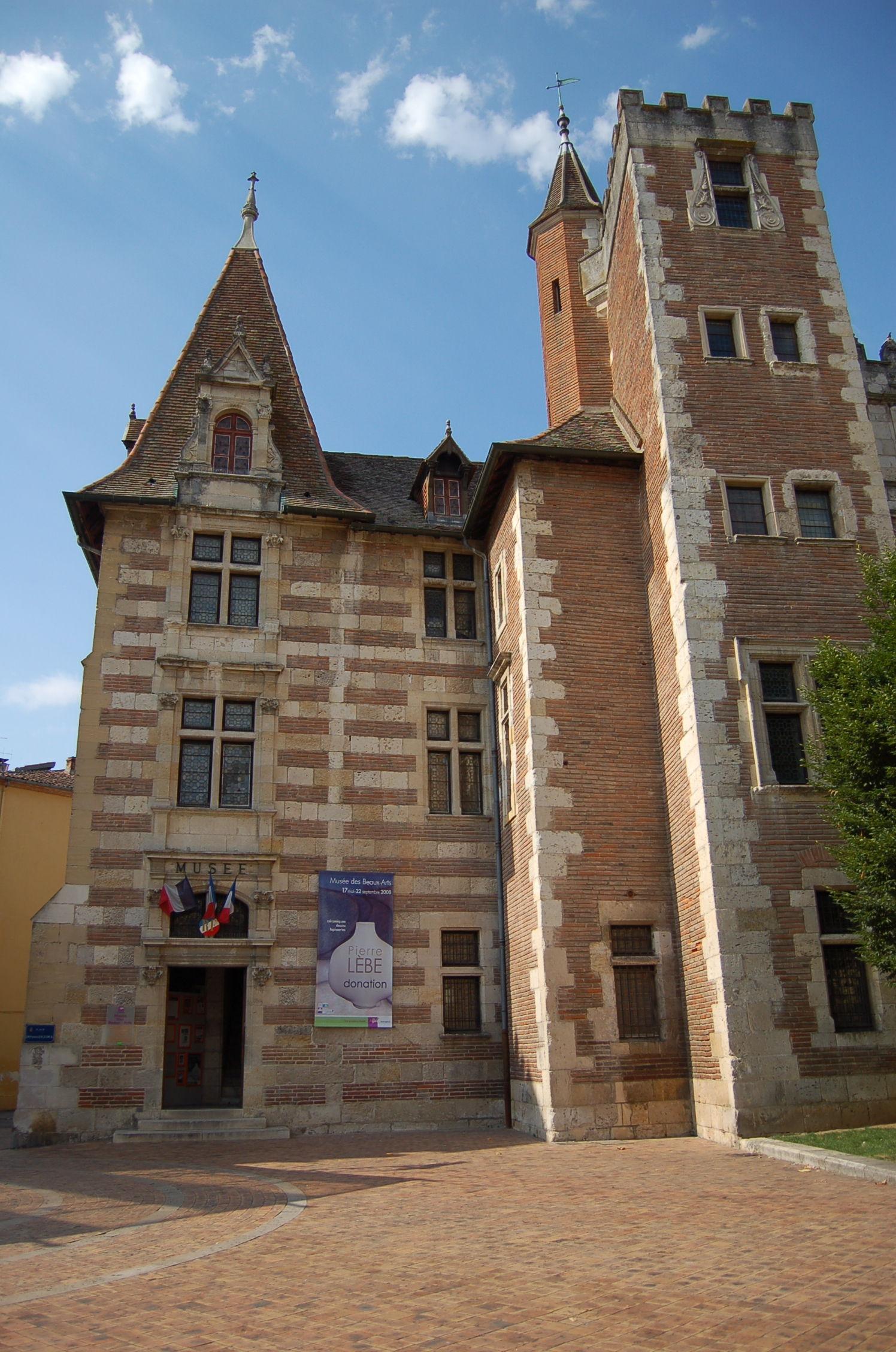 Musée des beaux arts d'Agen